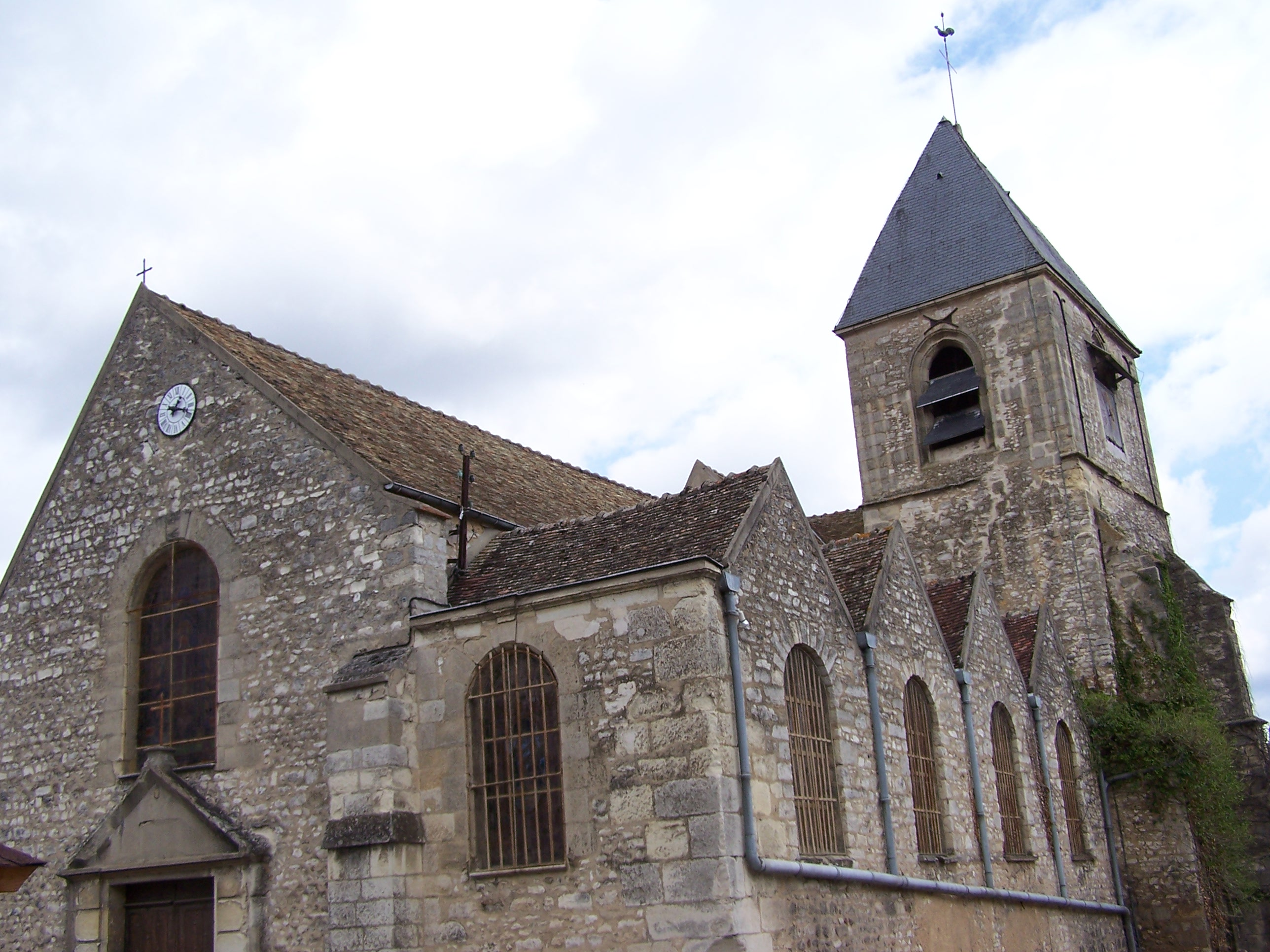 Église de Beynes (Yvelines, France). Photo personnelle. Church of Beynes (Yvelines, France). Personal photo. Auteur/Author : ℍenry Salomé